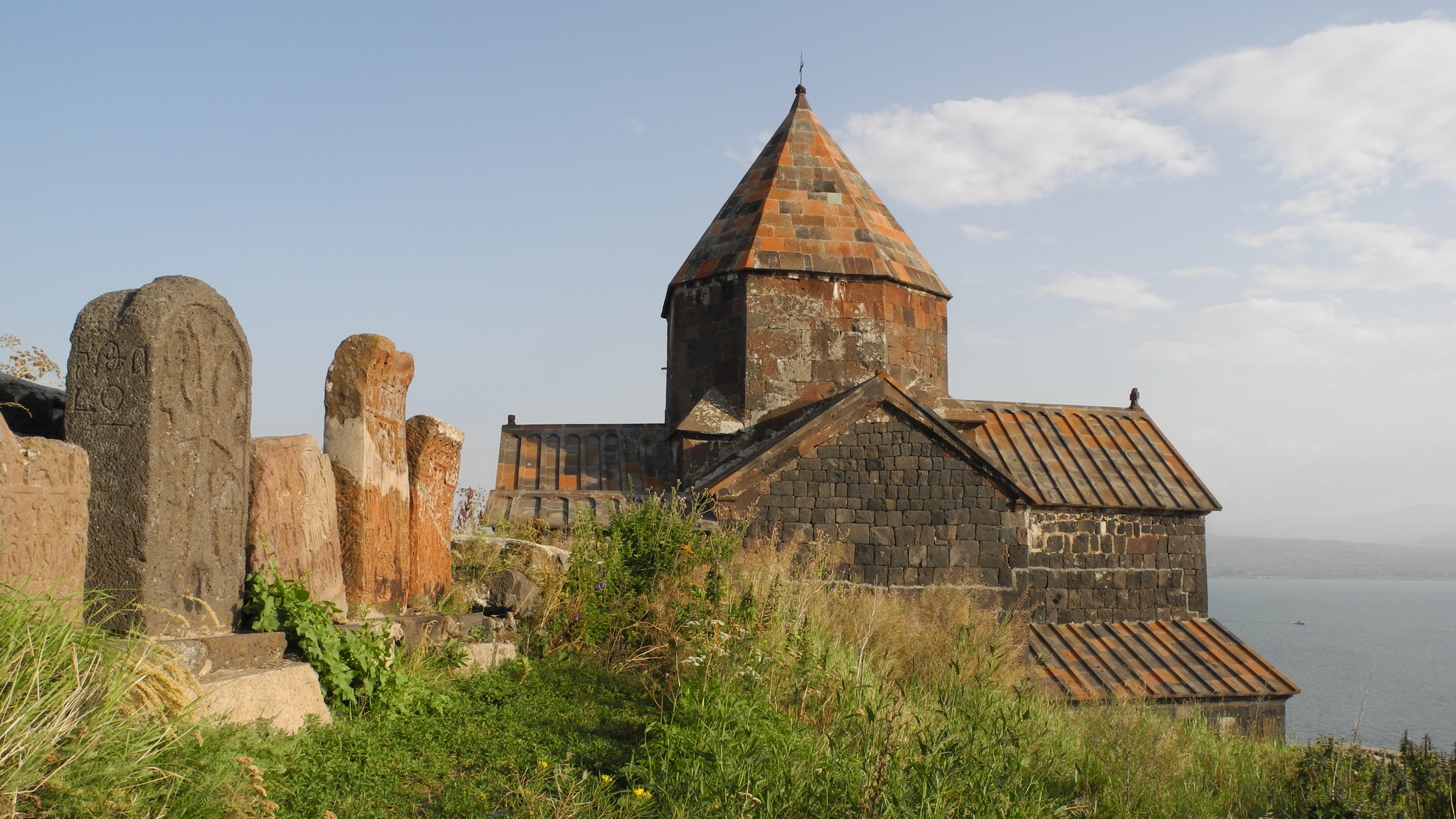 Sevanavank über dem Sewansee03